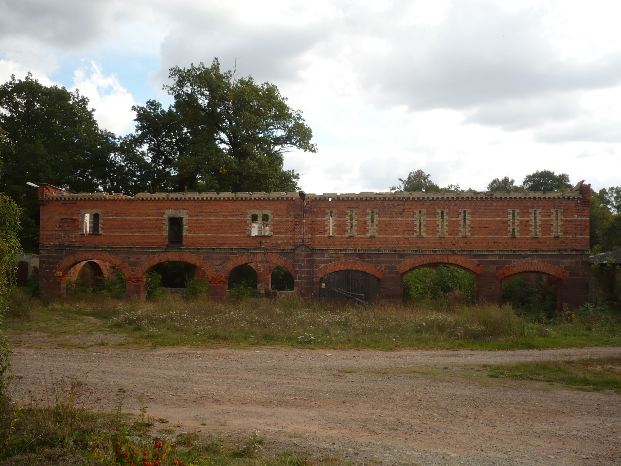 Sarny. Budynek gospod.